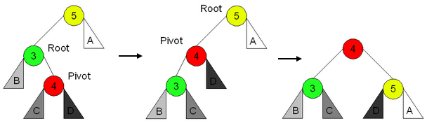 Imagem demonstrando como funciona uma rotação dupla à direita em uma árvore AVL.